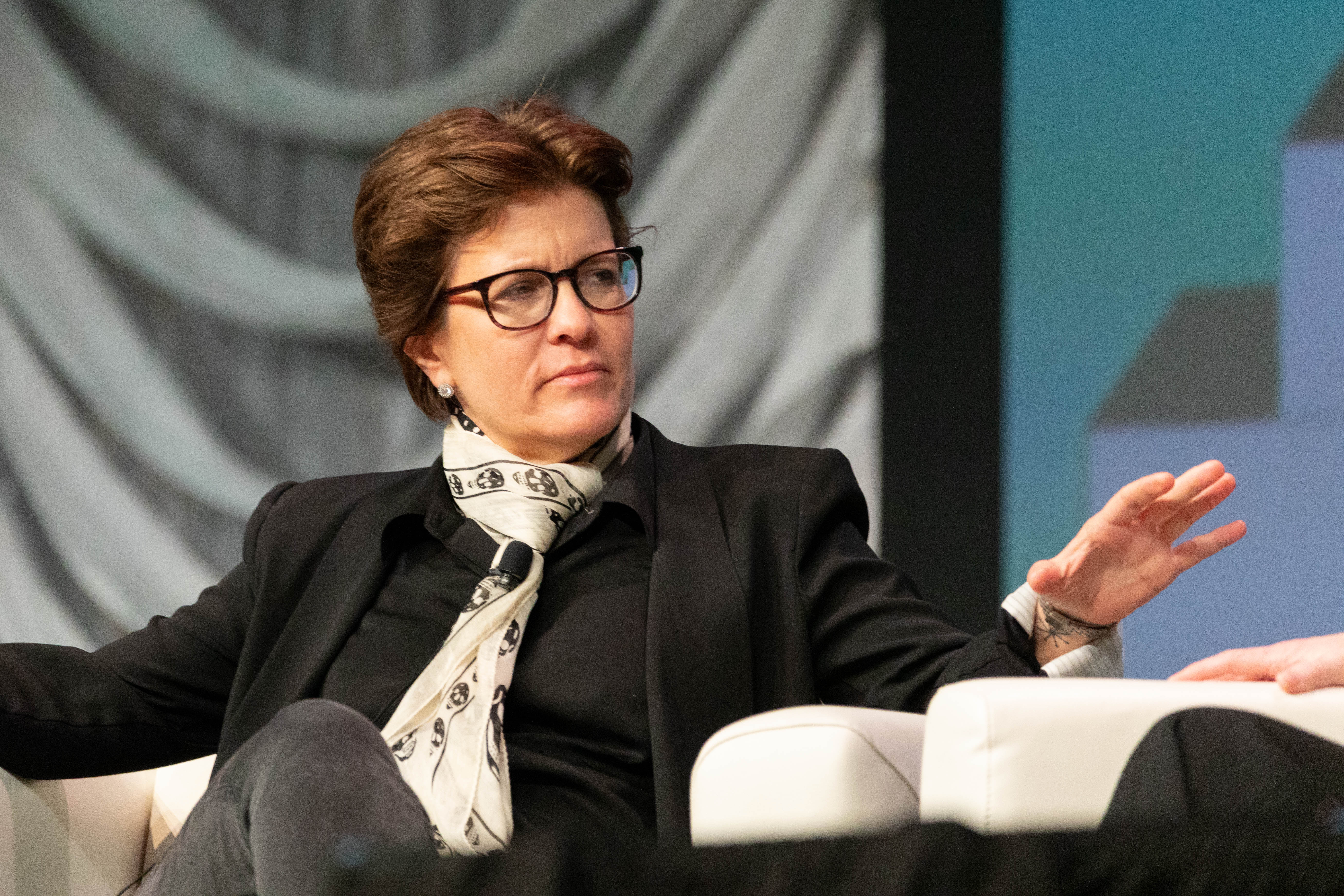 Photo: Ståle Grut / NRKbeta